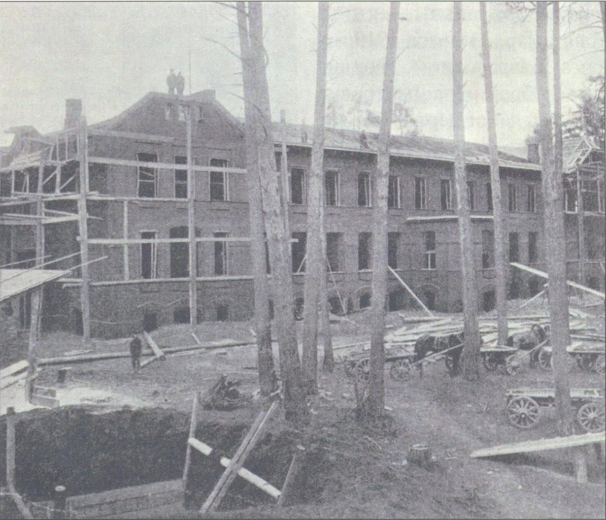 Строящееся здание Сергиево-Елизаветинского убежища